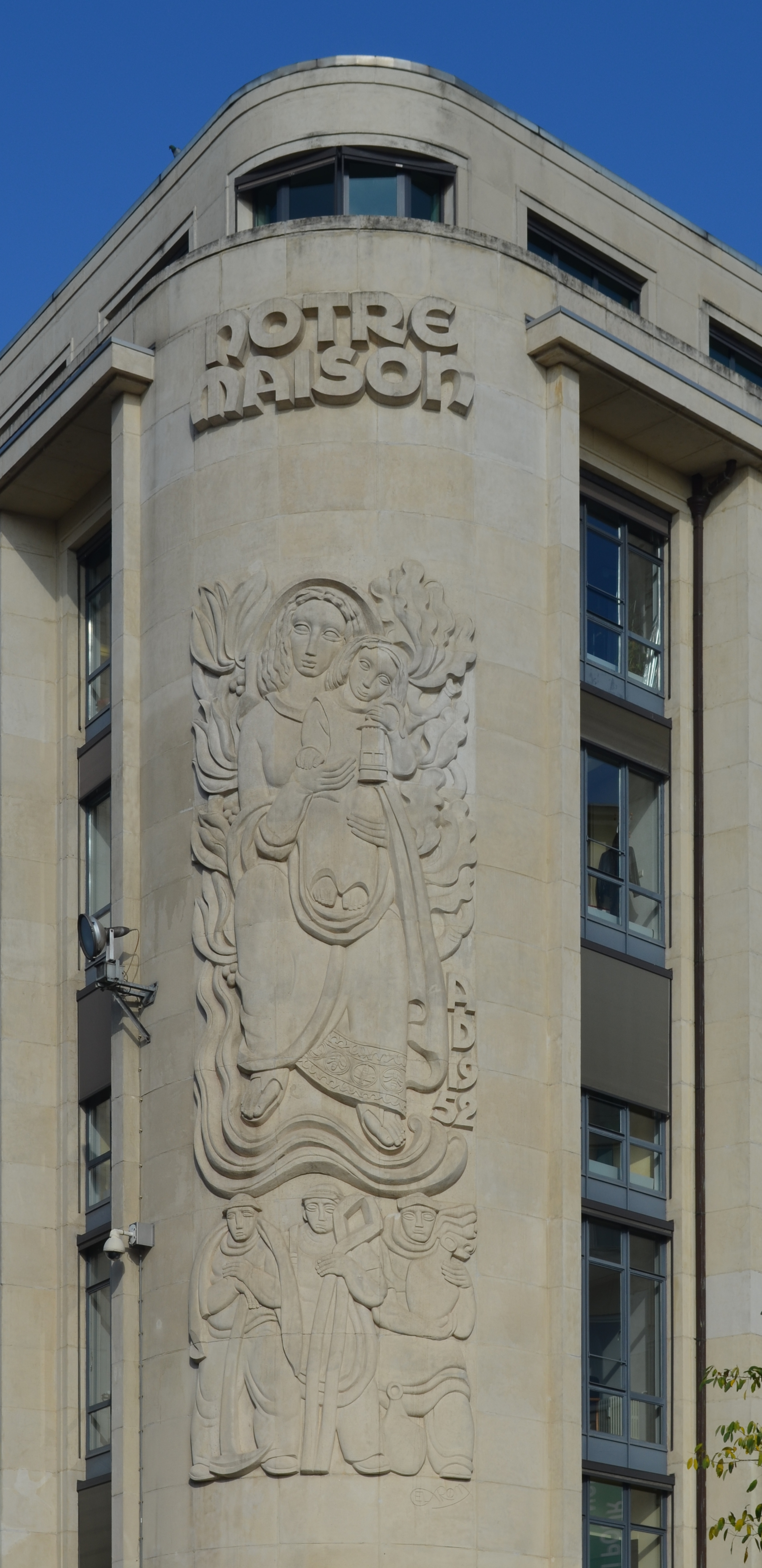 Charleroi (Belgique) - "Notre Maison", siège du Mouvement ouvrier chrétien de la région de Charleroi, boulevard Joseph Tirou 167 à Charleroi. Bas relief par Harry Elstrøm (1906-1993) représentant une Vierge à l'enfant et trois ouvriers, un mineur, un sidérurgiste et un potier (ou verrier).